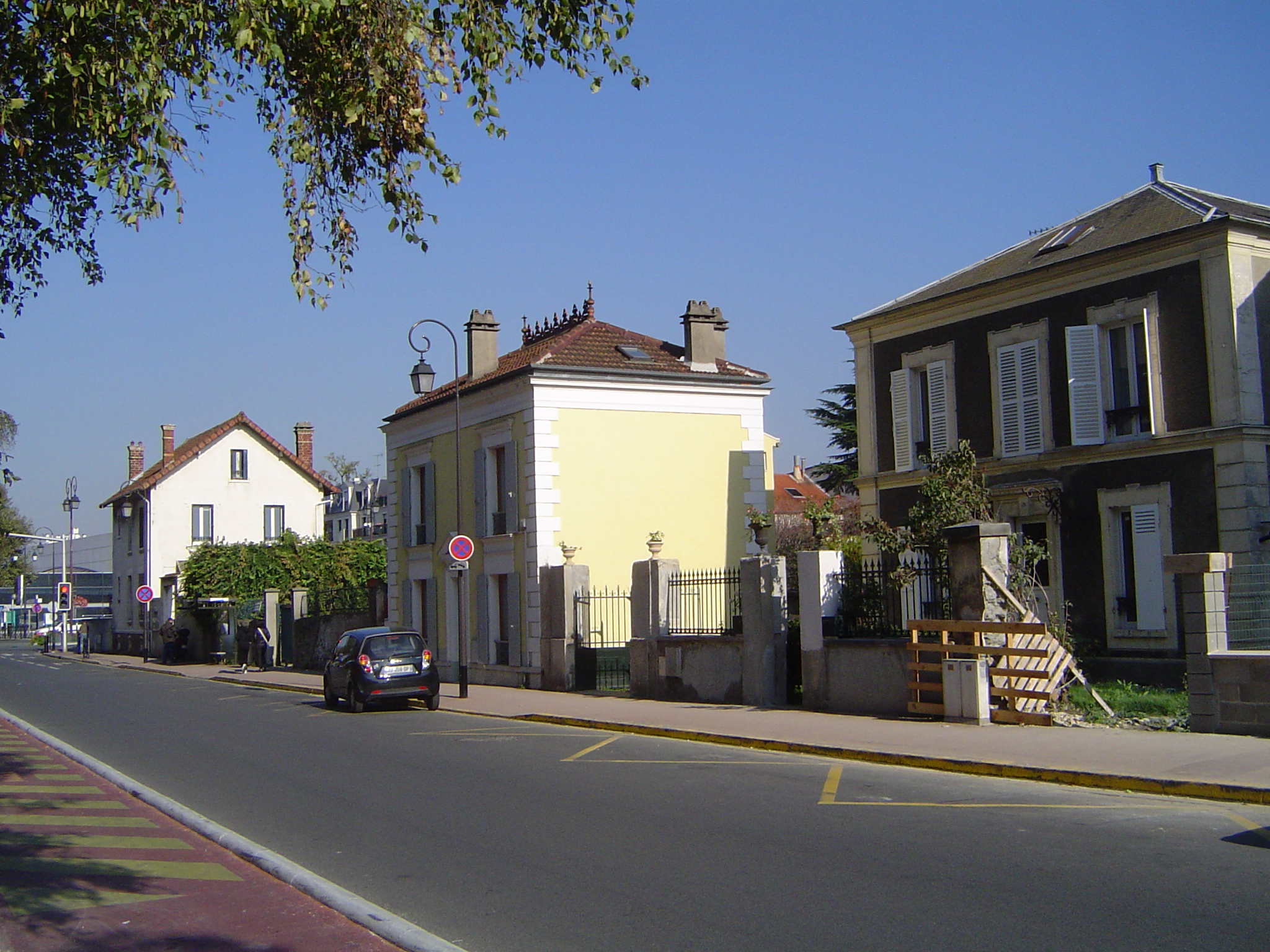 Photo prise à Antony (France)